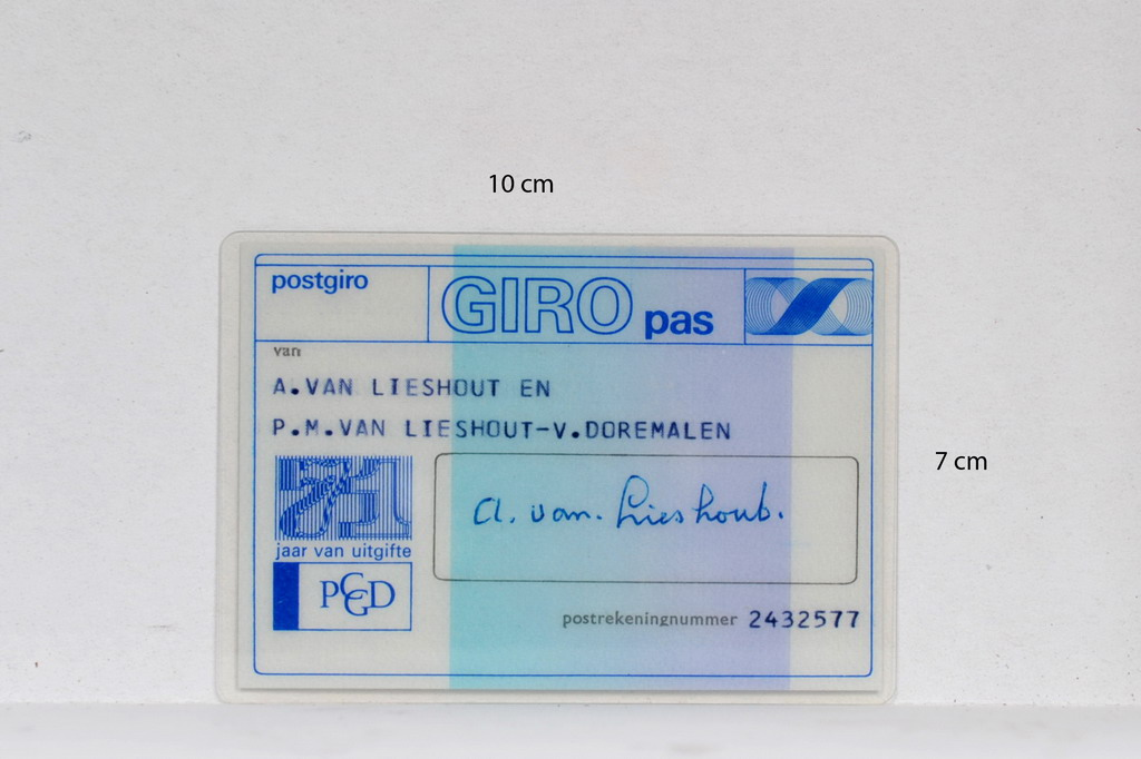 Postgiro (Post Cheque en Girodienst (PCGD))